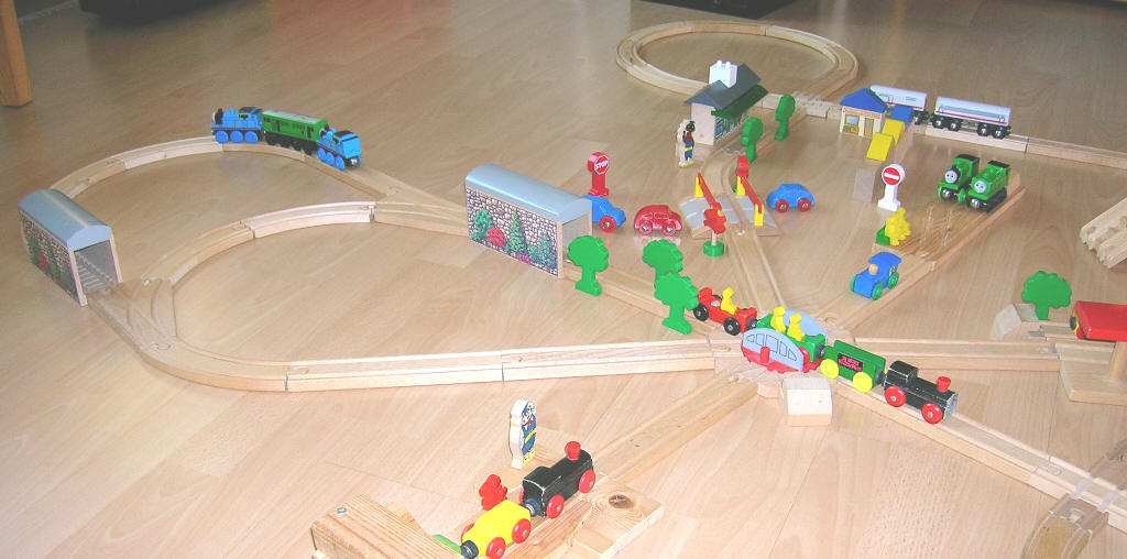 Holzeisenbahn